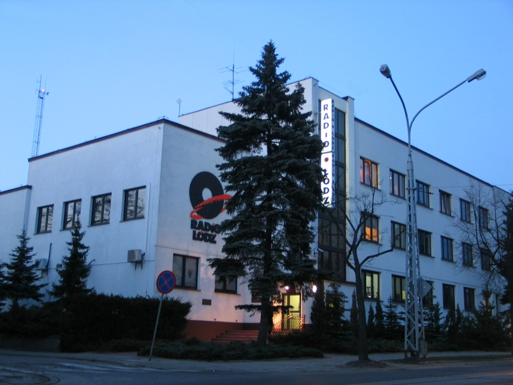 Budynek Radia Łódź